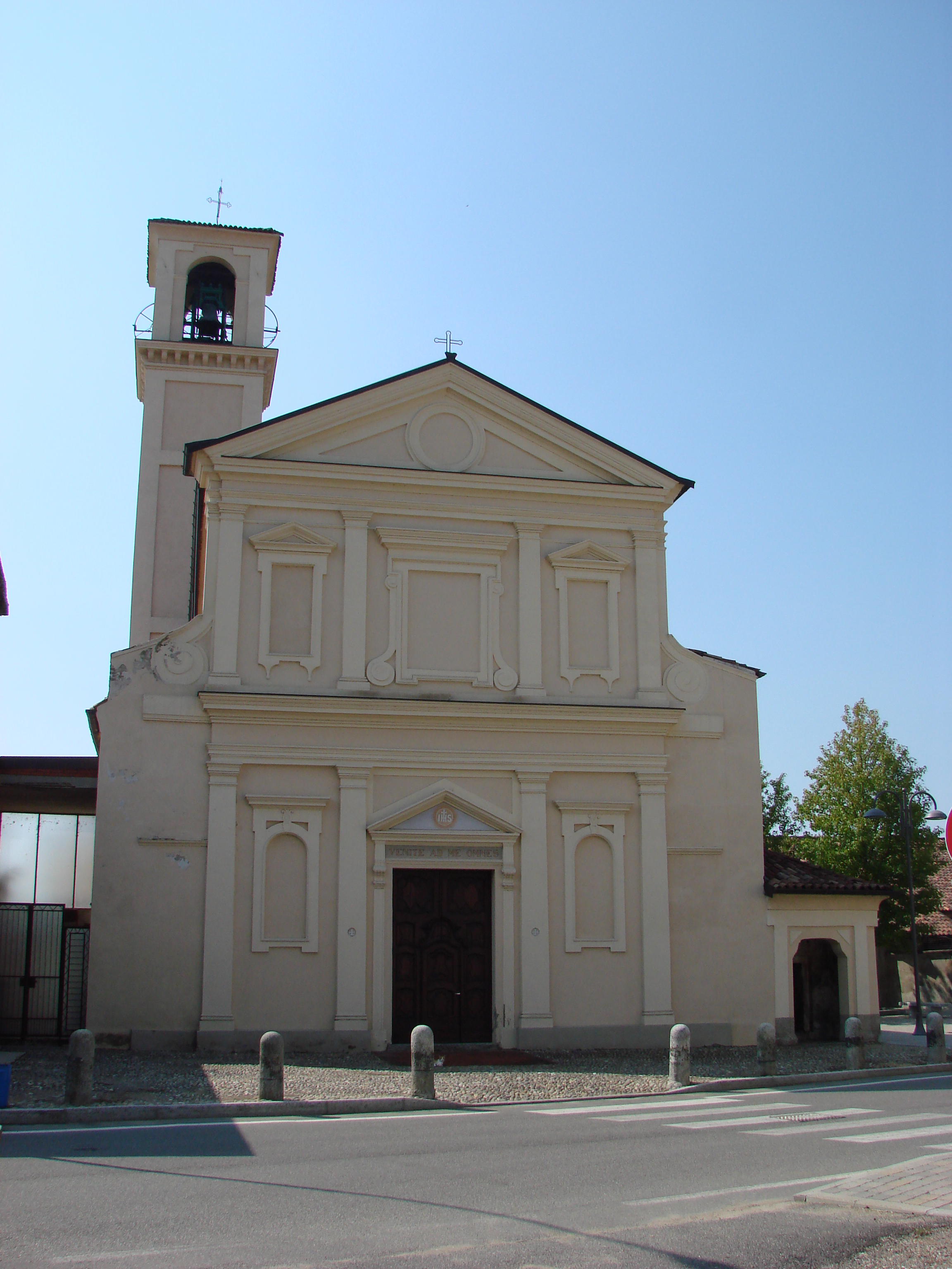 Chiesa parrocchiale di Sant'Apollinare a Torriano, fraz. di Certosa di Pavia